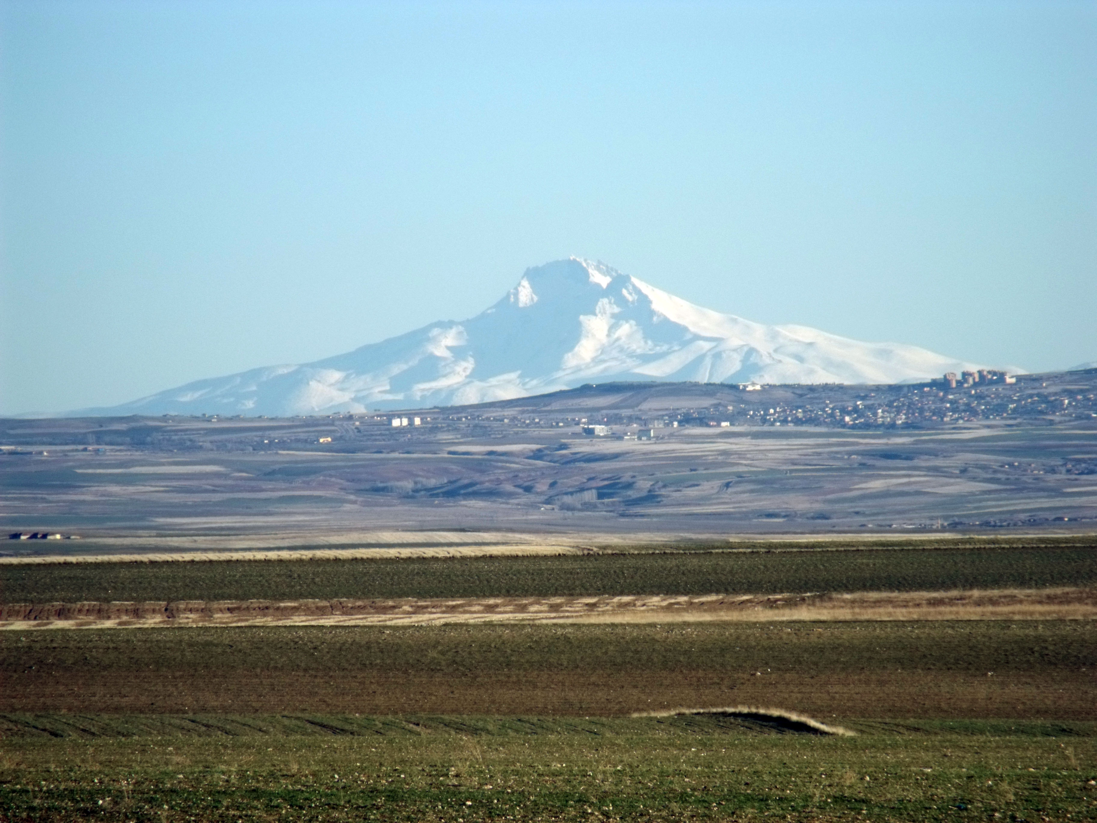 Erciyes